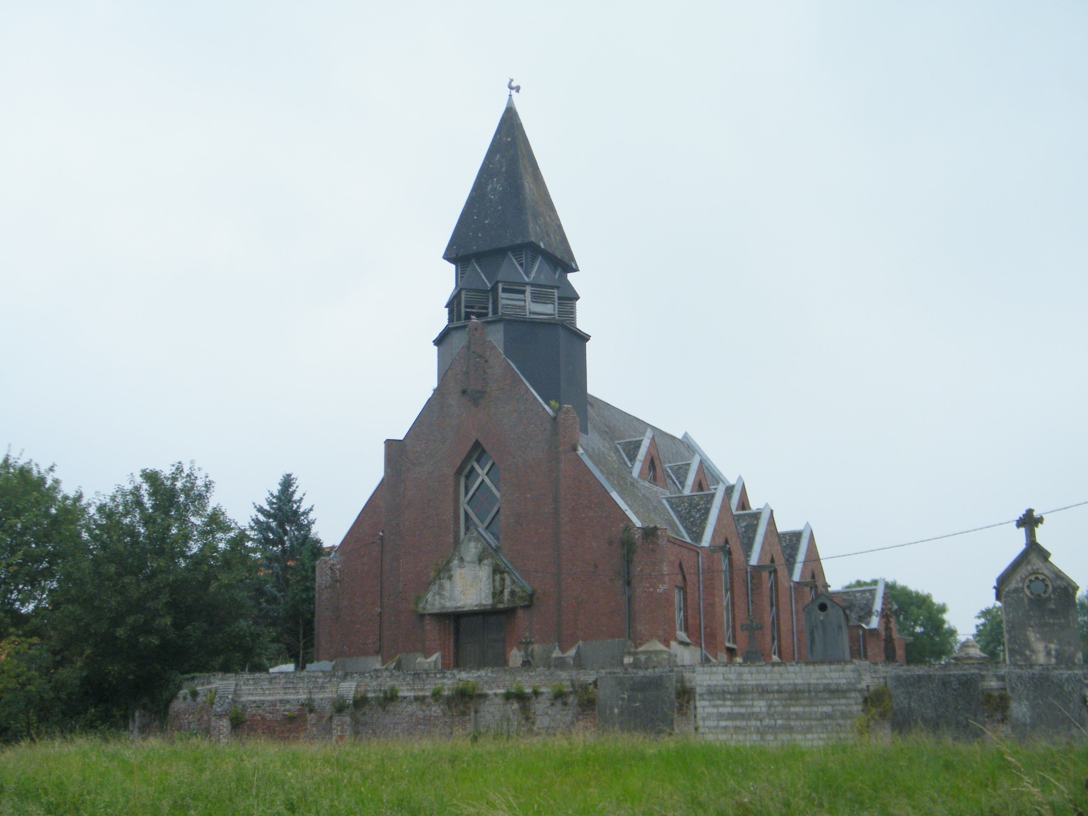 Eglise.